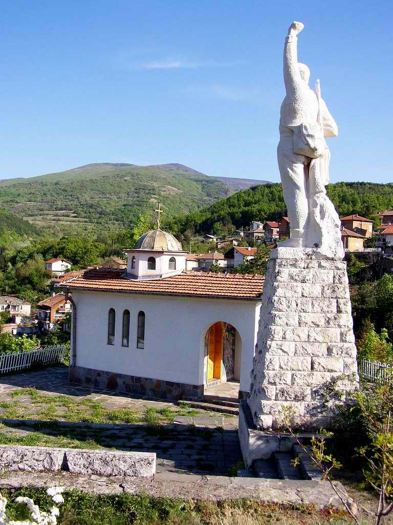 Параклисът Свети Димитър и партизански паметник край с. Храбрино